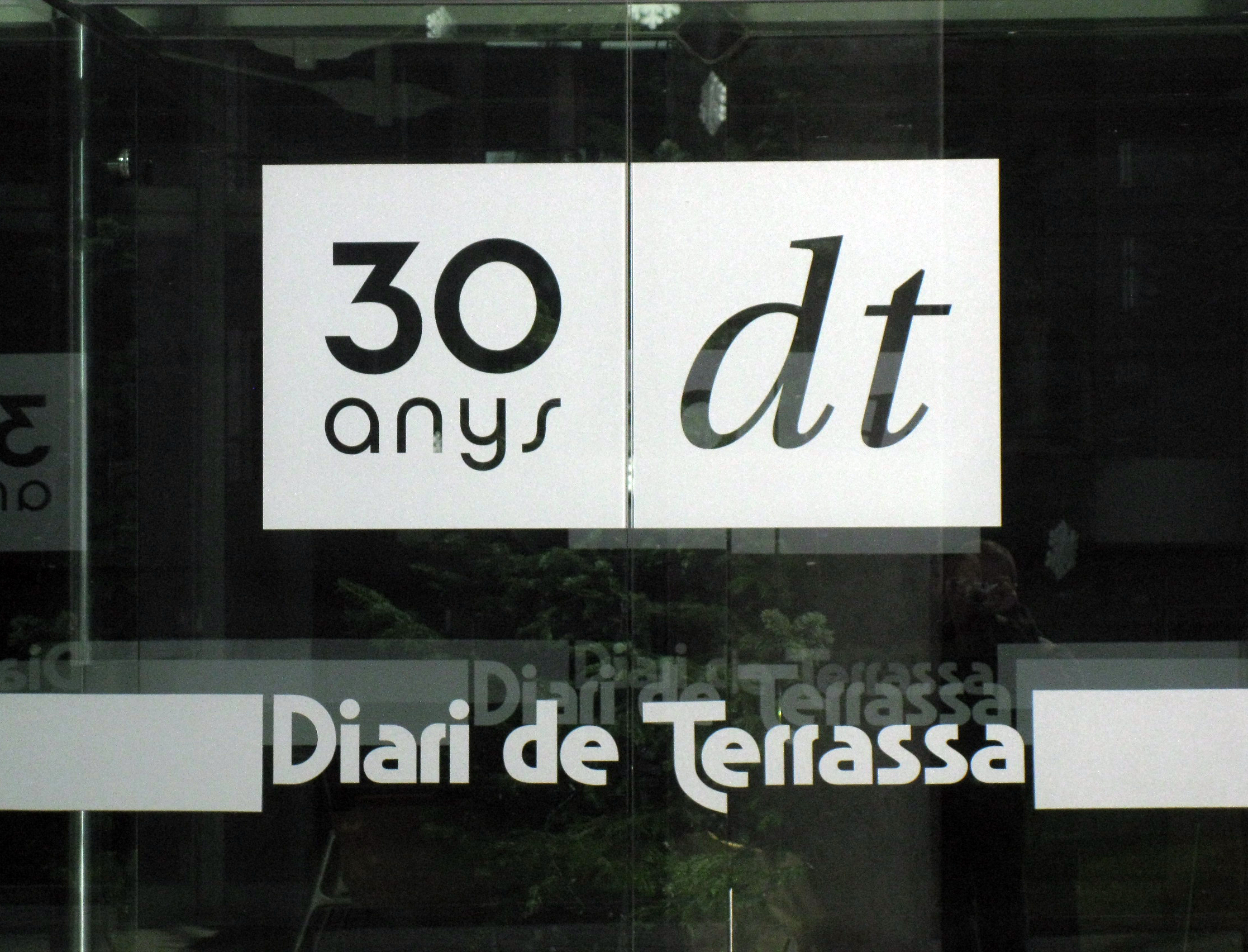 Logotip del Diari de Terrassa, a l'entrada de l'edifici.